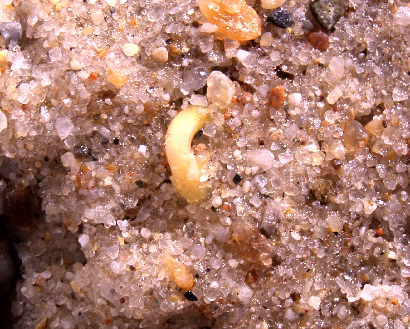 1 day old Pinus jeffreyi. Einen Tag alte Jeffrey-Kiefer. Hypokotyl. Freysfura, eins dags gamals.